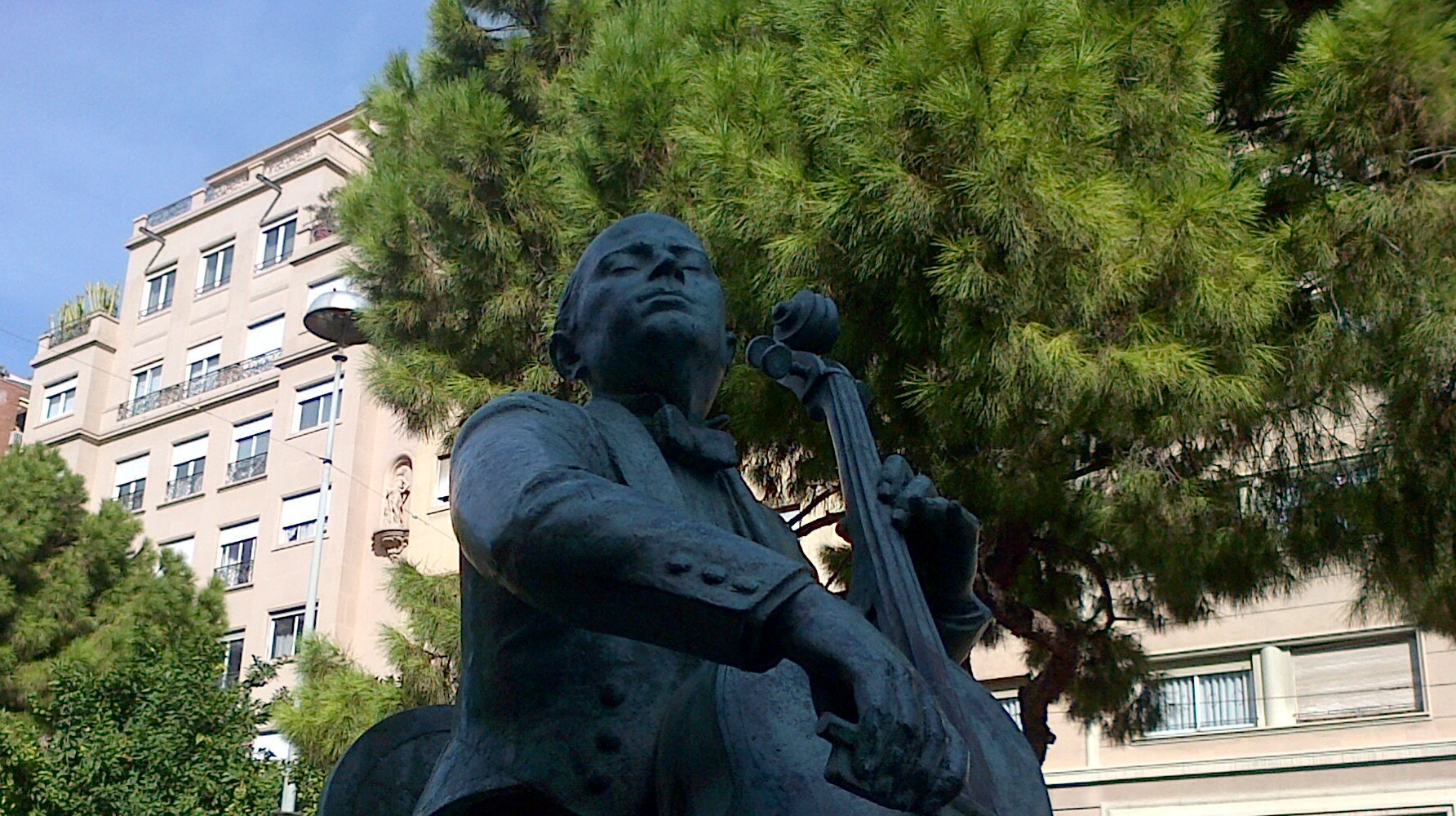 Escultura de Josep Viladomat i Massanas a Pau Casals, del 1940